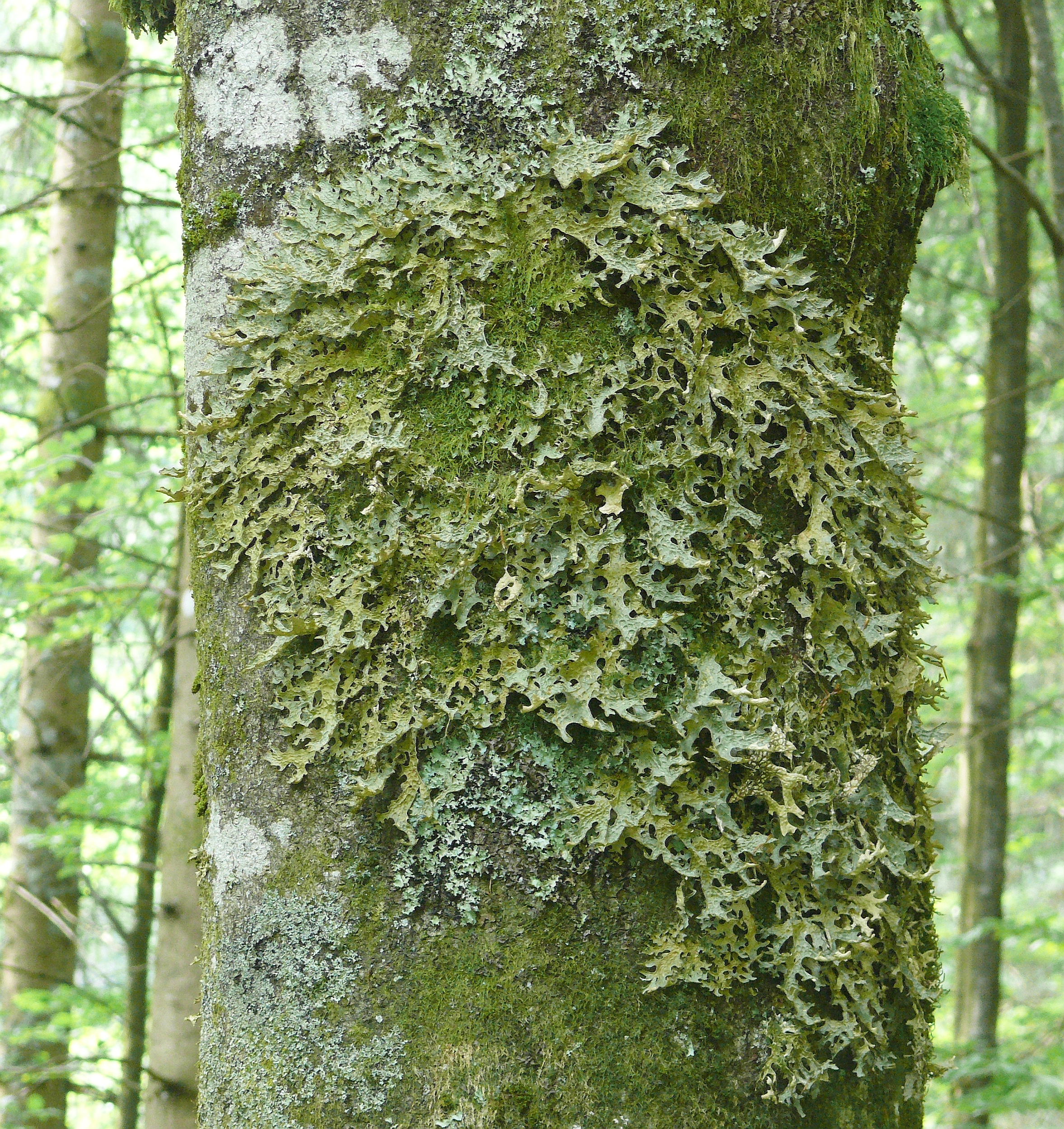 Lobaria amplissima, Allgäuer Alpen, Deutschland